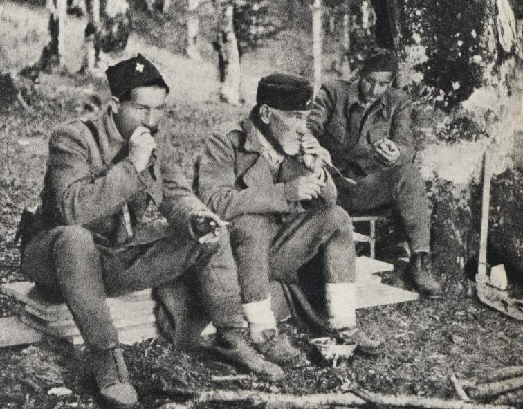 Vlada Zečević i Fjodor Mahin, 1942. godine.